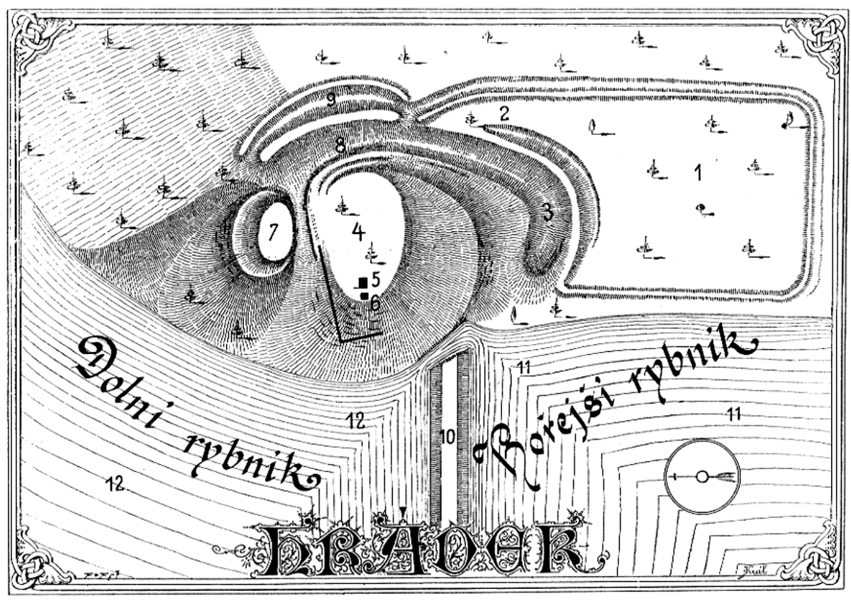 Lacembok – půdorys hradu z roku 1893 (1 – předhradí, 2 – šíje, 3 – příkop, 4 – horní hrad, 5 – studna, 6 – chodba ke studni, 7 – torzo věže, 8 – příkop, 9 – příkop, 10 – hráz, 11, 12 – rybníky)